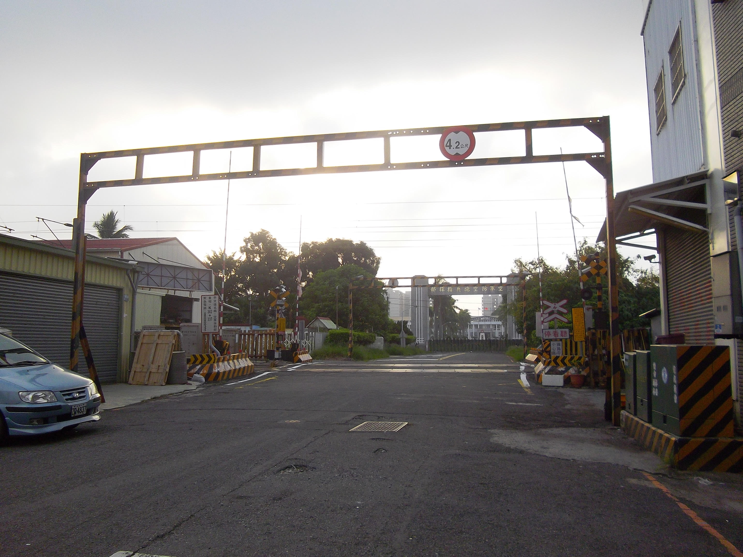 中華民國空軍防空砲兵指揮部（空軍長安營區）大門前，空軍後勤部平交道。